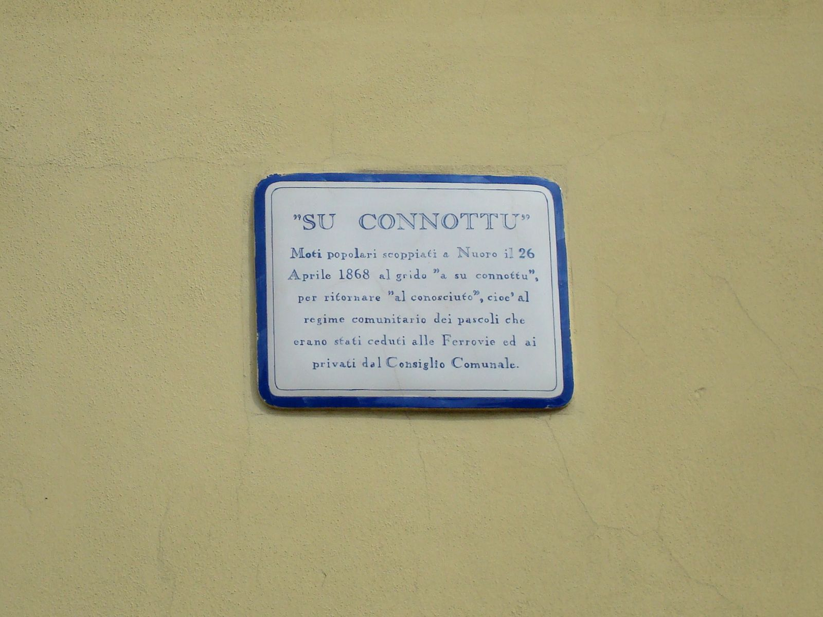 Targa posta in piazza Su Connottu a Nuoro.